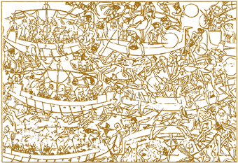 Bas-relief du temple funéraire de Medinet-Habou, Égypte, montrant les Egyptiens combattant les peuples de la mer.